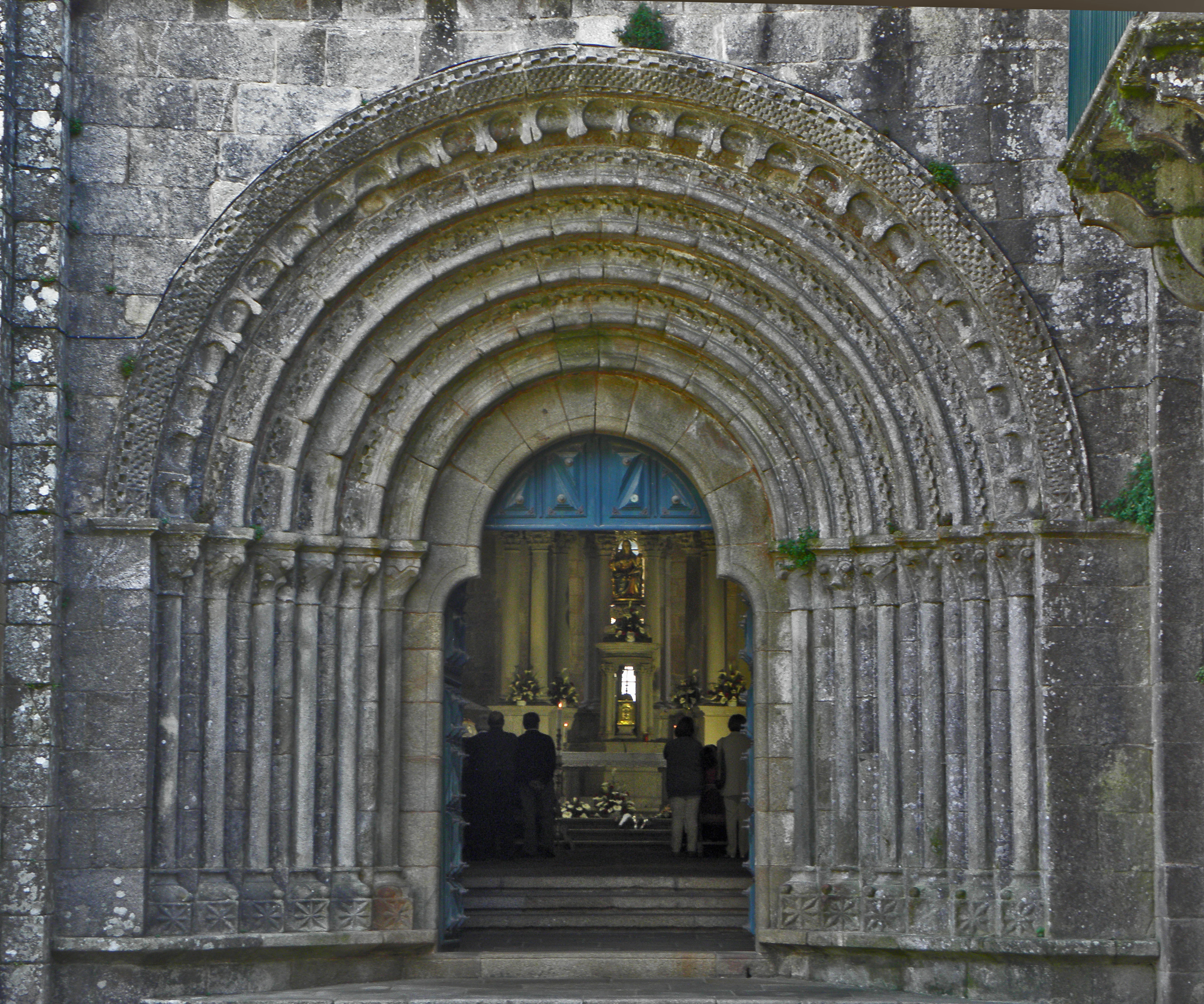 Don Ero de Armenteira creou unha das xoias máis grande da arte románica galega , que aínda conserva intacto o seu esplendor. En canto á súa fachada, é un dos mosteiros cistercienses de Galicia que a mantén intacta. E se a igrexa é unha obra digna de admirar, non o son menos o resto das edificacións, dos séculos XII, XIV e XVIII. Consérvanse en moi bo estado o mosteiro de Armenteira, como tamén o seu campanario barroco do ano 1778, a súa sancristía neoclásica de planta cadrada, cuberta de granito, ou o claustro renacentista onde se dispoñen as estancias do mosteiro. Santa María, actualmente igrexa parroquial, foi declarada Monumento Histórico-Artístico